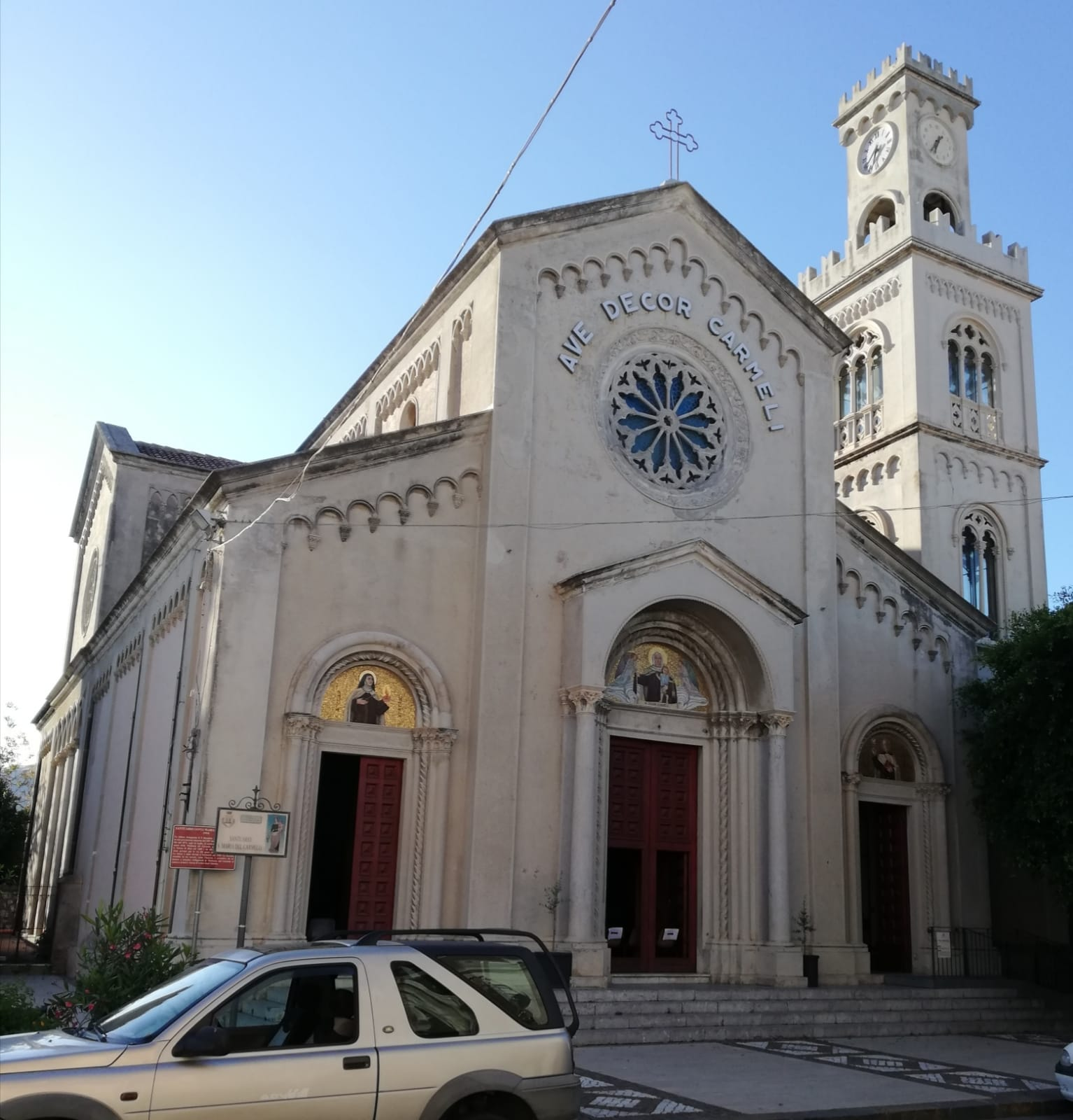 Prospetto principale del Santuario della Madonna del Carmelo